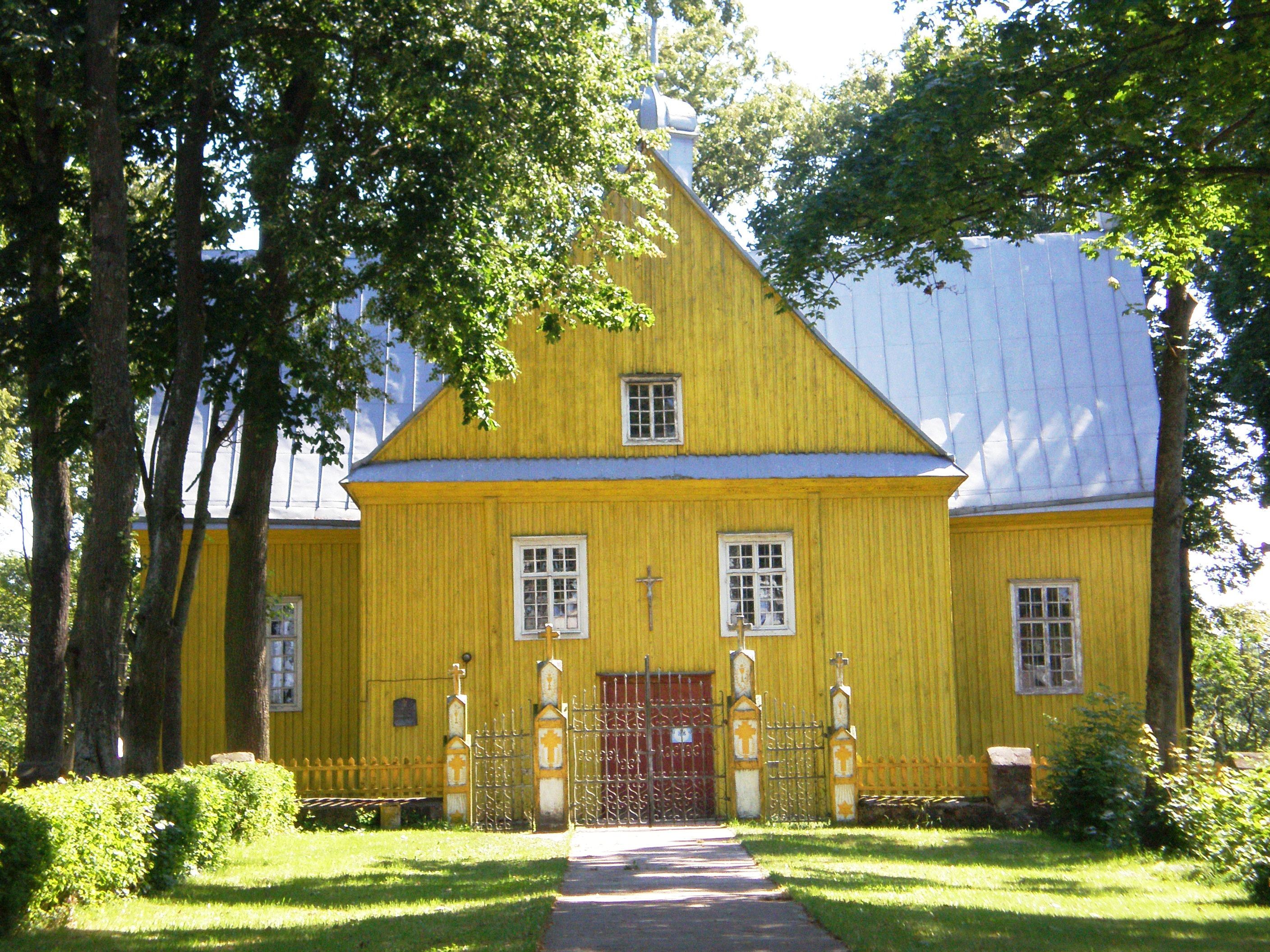 Surviliškis Churc, Lithuania